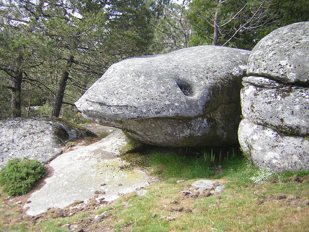 Roca-Cara